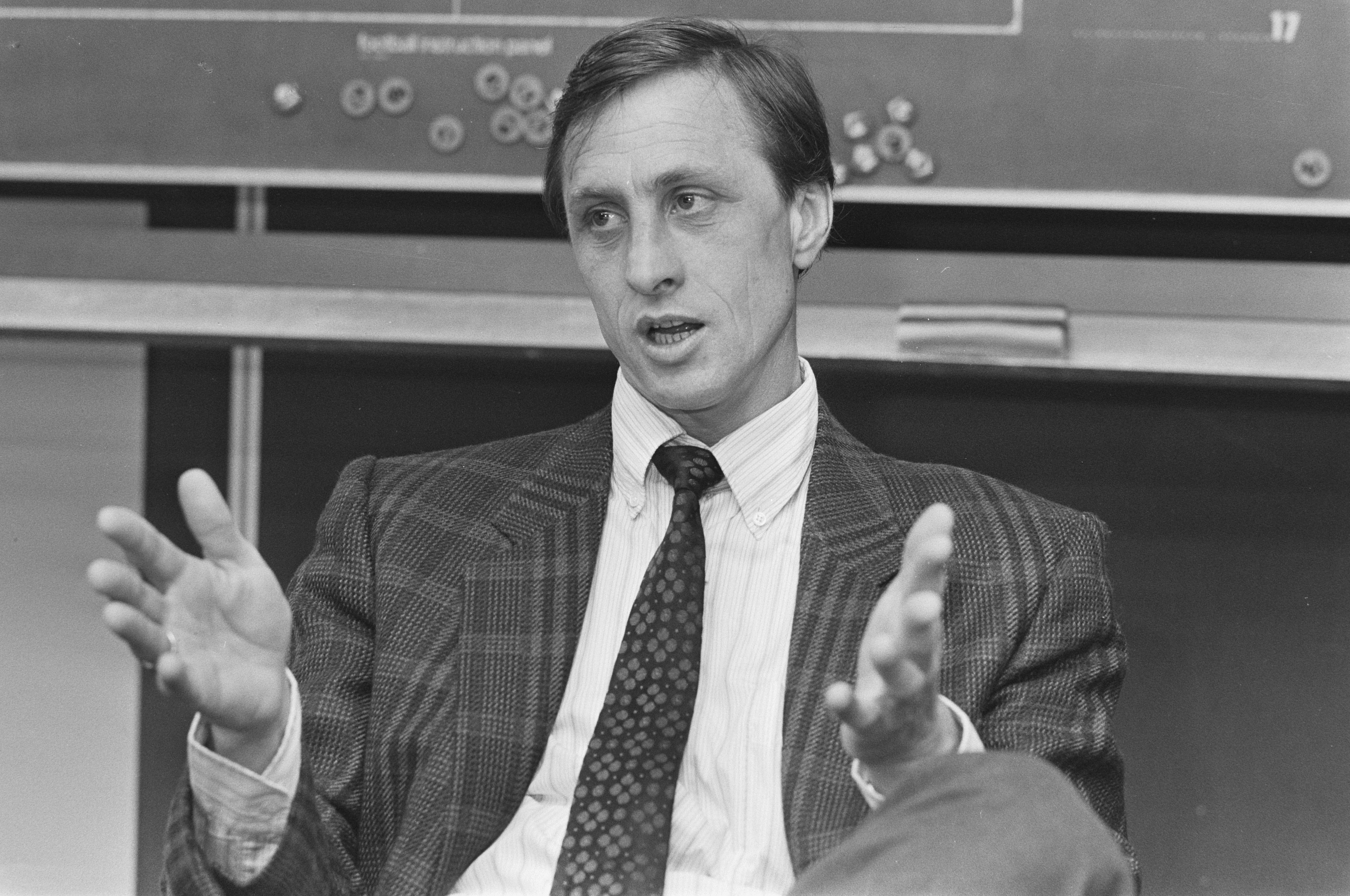 Persconferentie Ajax; Johan Cruyf; 20 april 1987